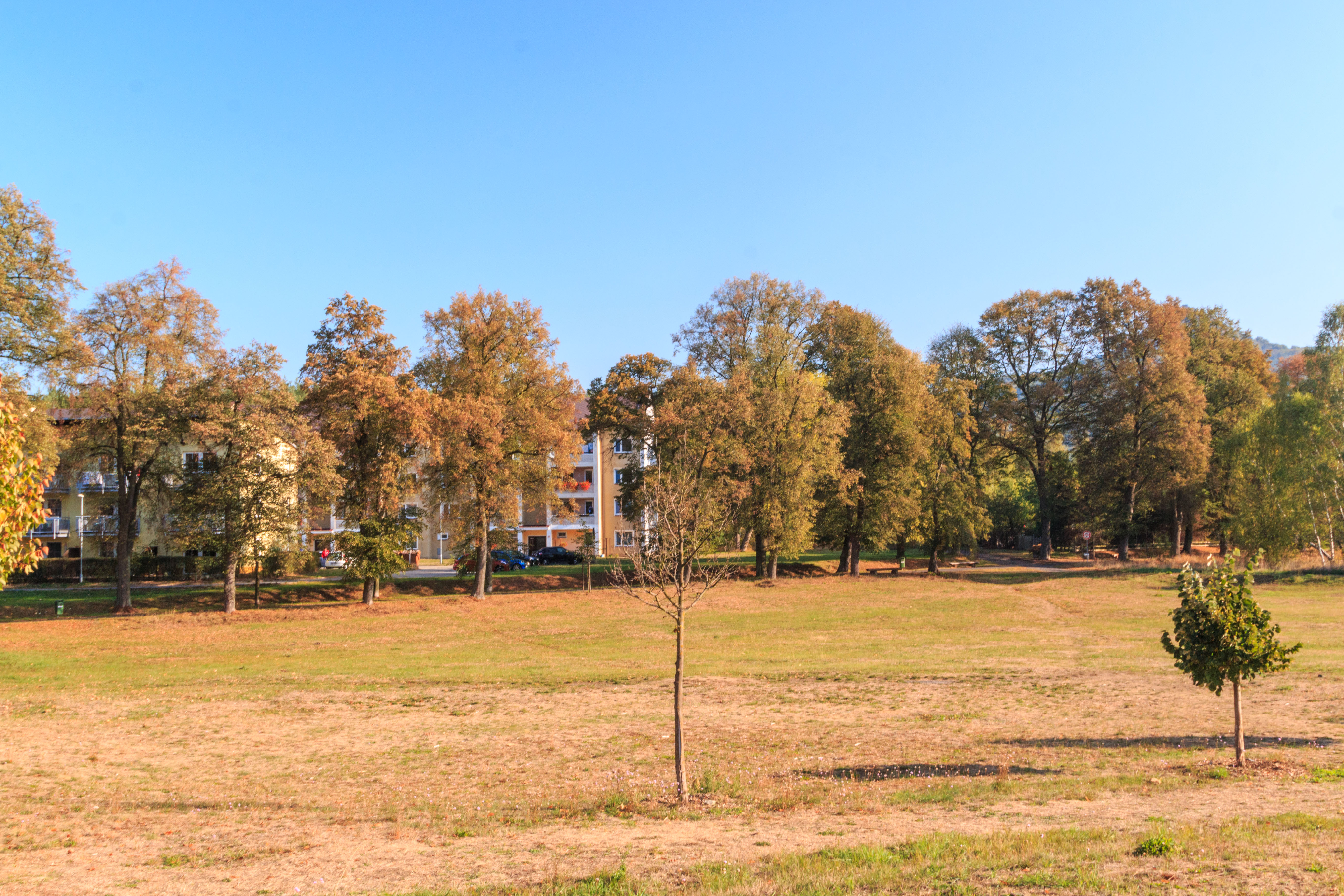 Vranovská alej v Mimoni Project: Vodstvo.